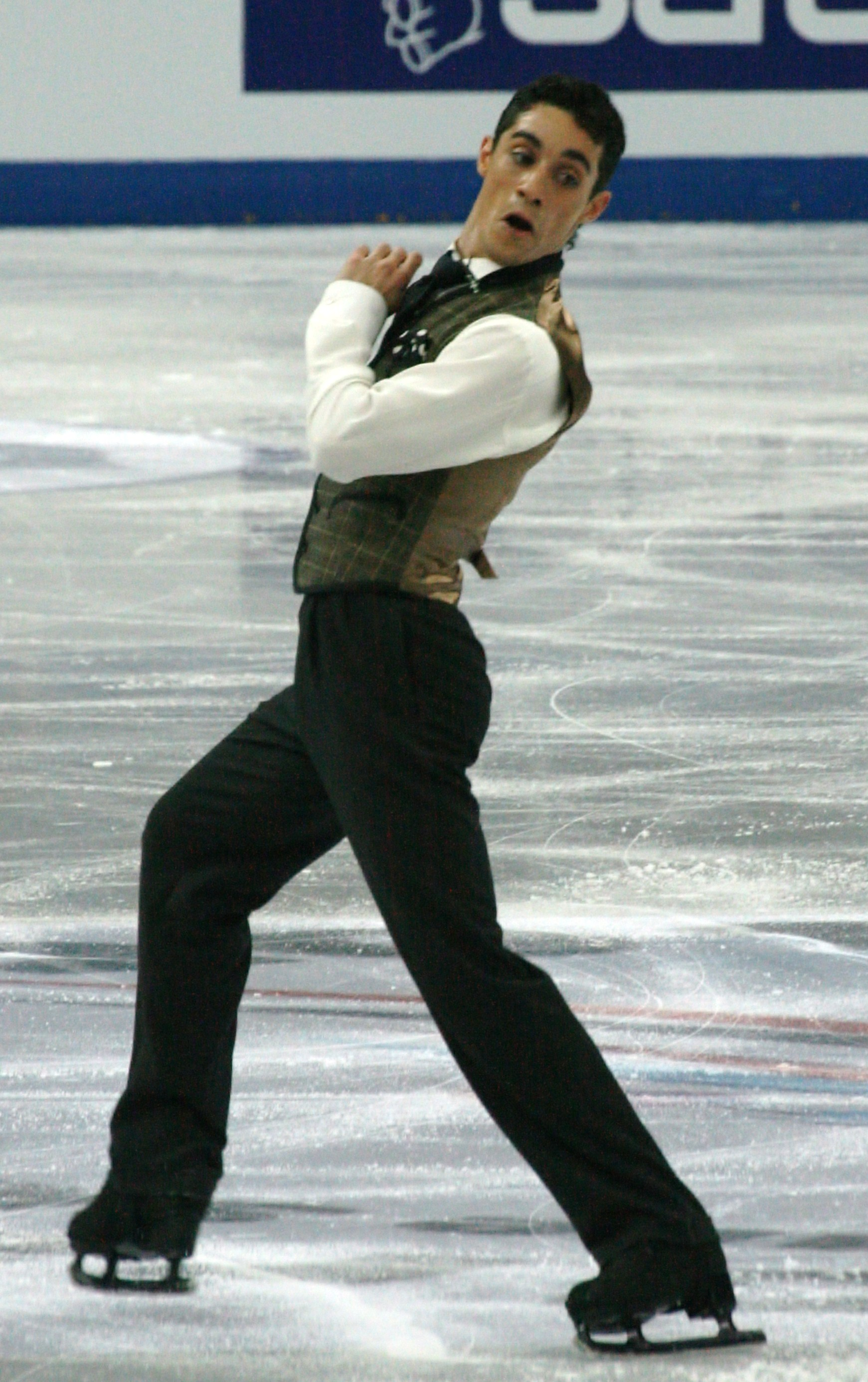 Хавьер Фернандес (Испания) на финале Гран-при 2012-2013. Произвольная программа.